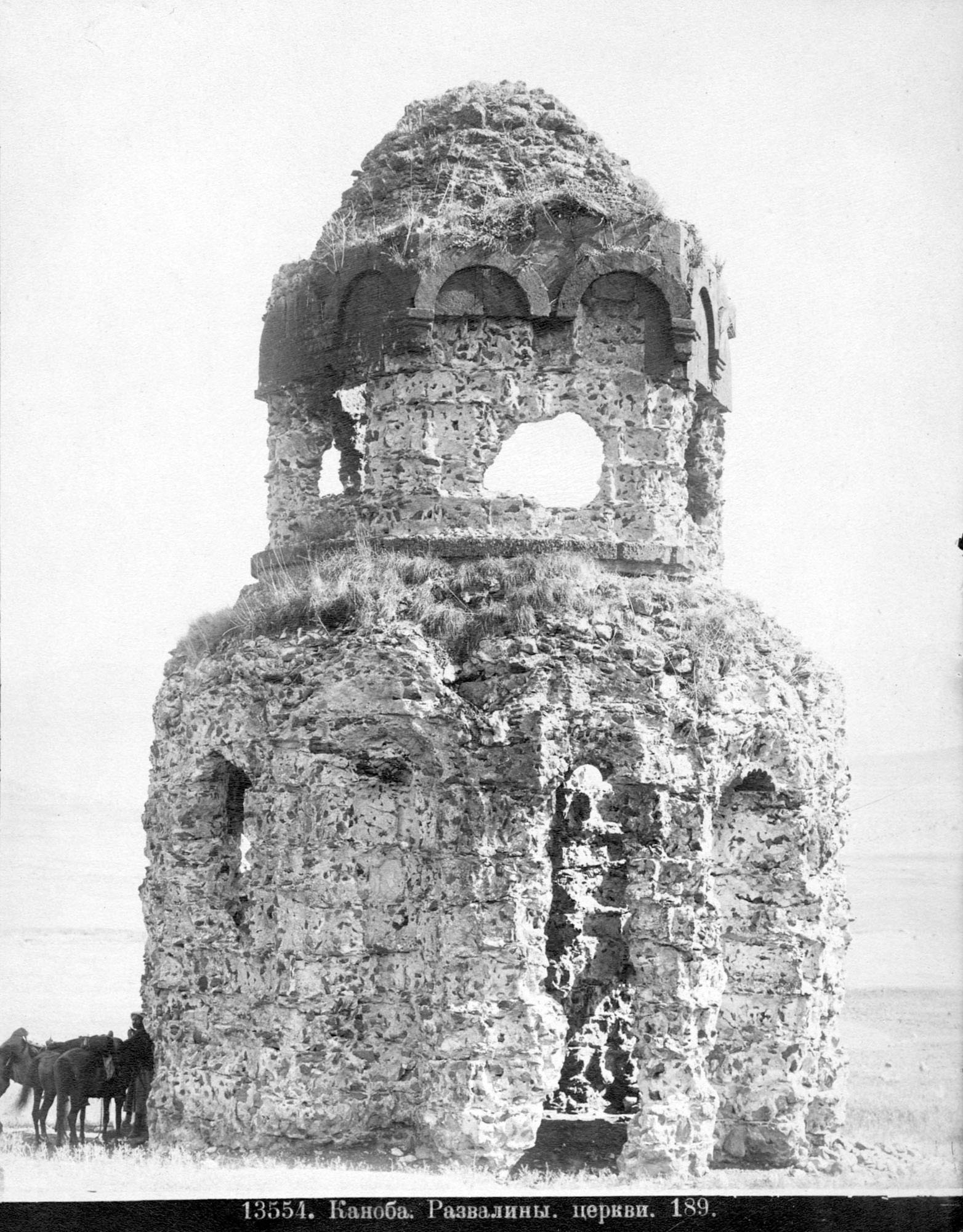 გოგიუბას ეკლესია